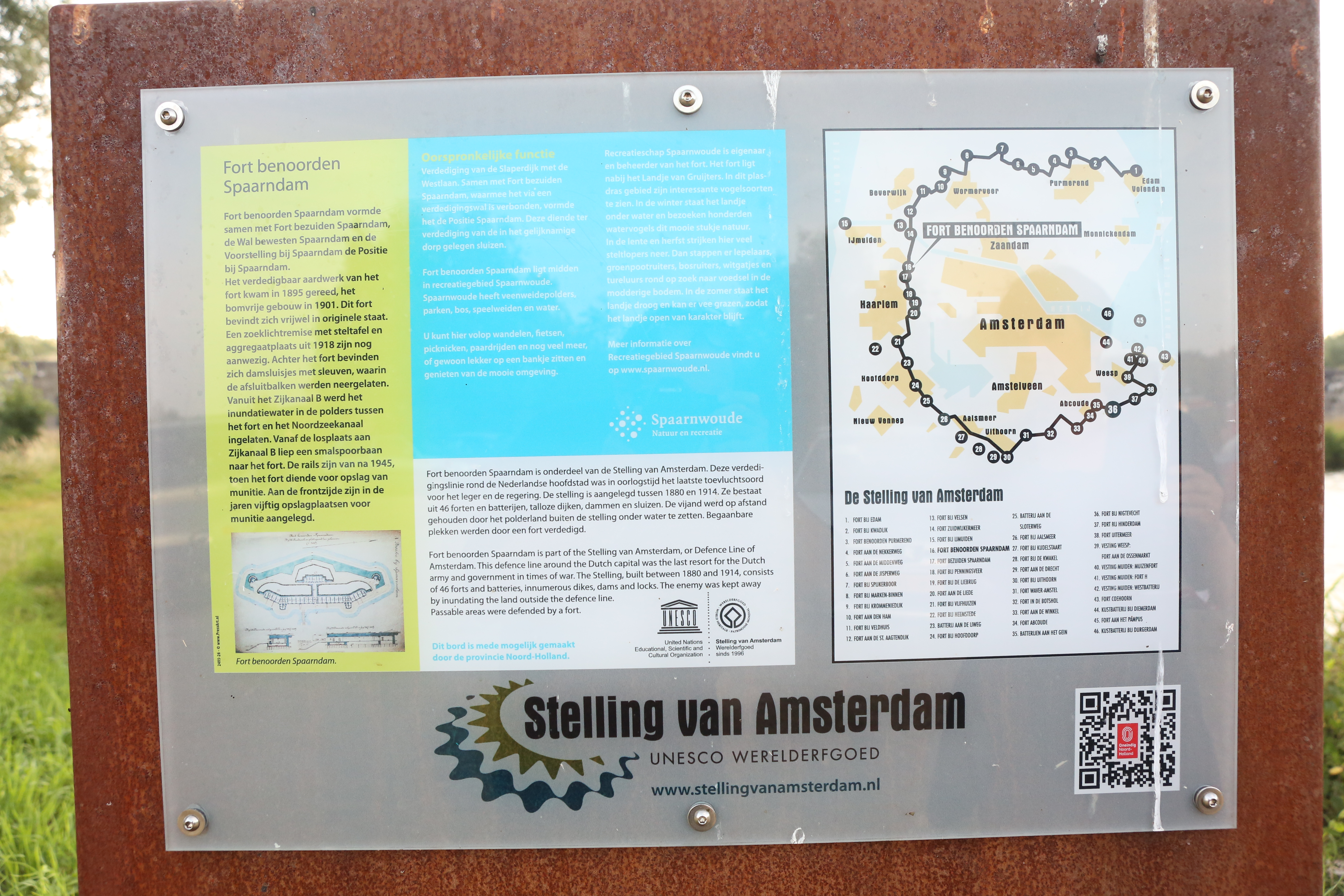 Fort benoorden Spaarndam